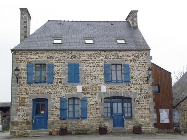 Mairie de Broualan (35).